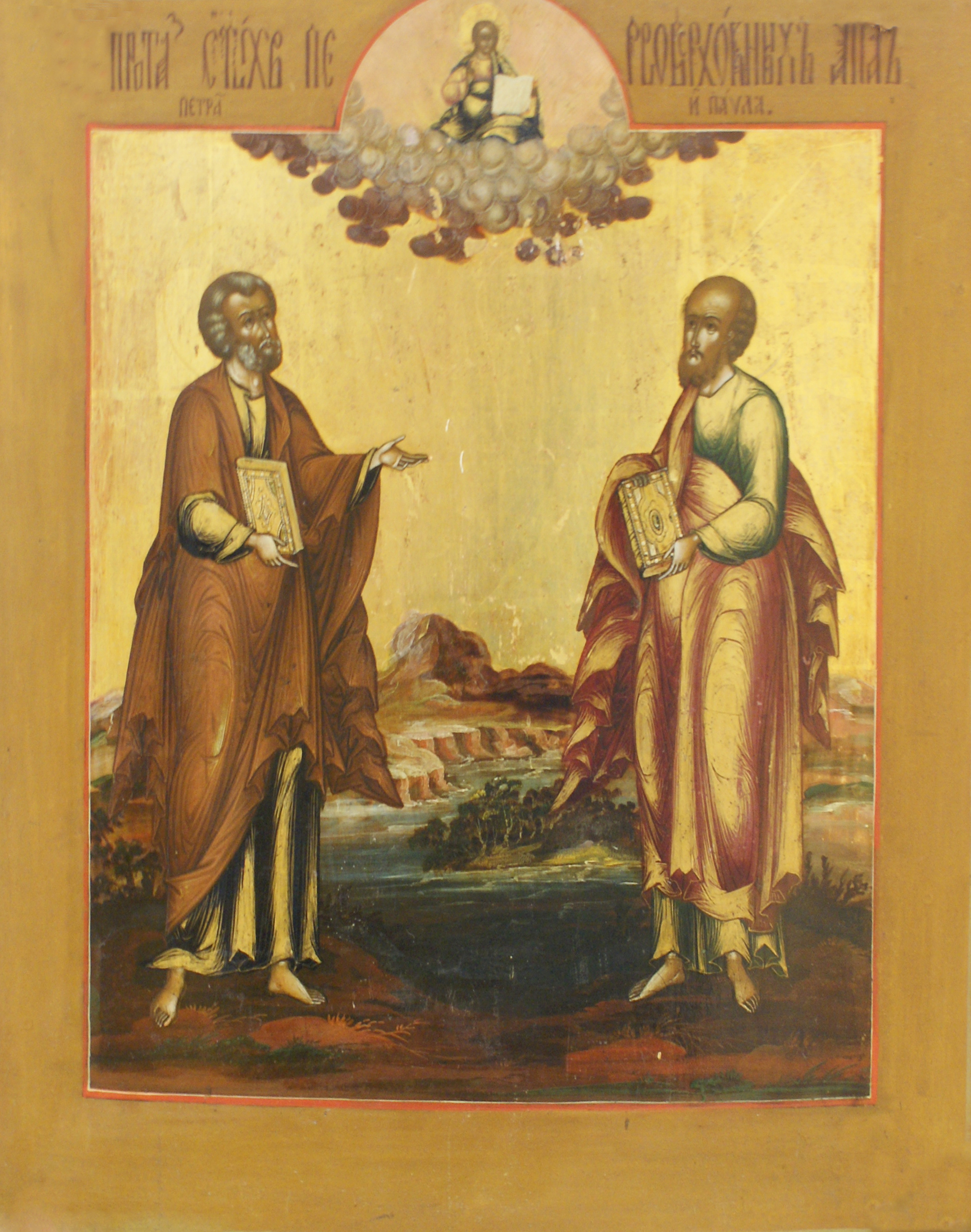 Абраз "Святыя апосталы Пётр і Павел". Расія. Дрэва, ляўкас, тэмпера